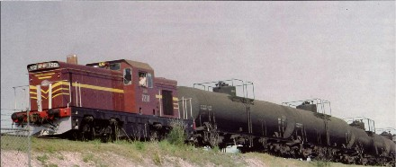 NSWGR diesel locomotive 7201